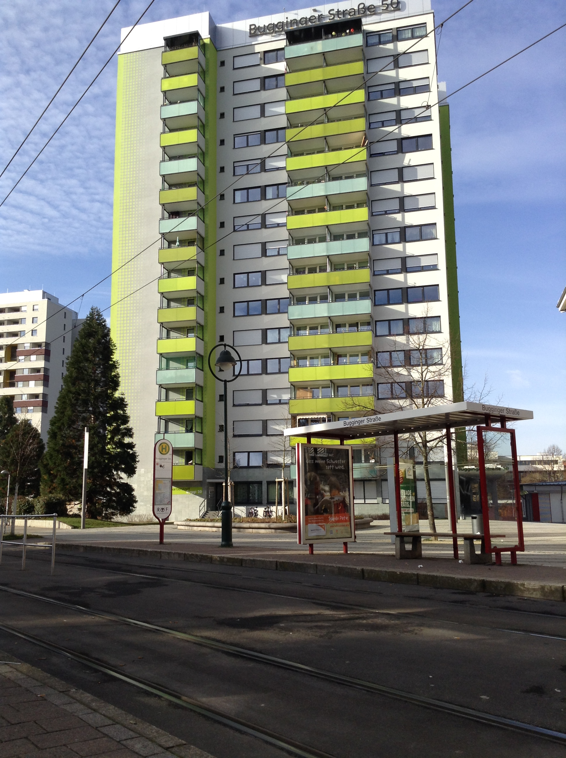 Halteselle Bugginger Straße, im Hintergrund Passivhochhaus